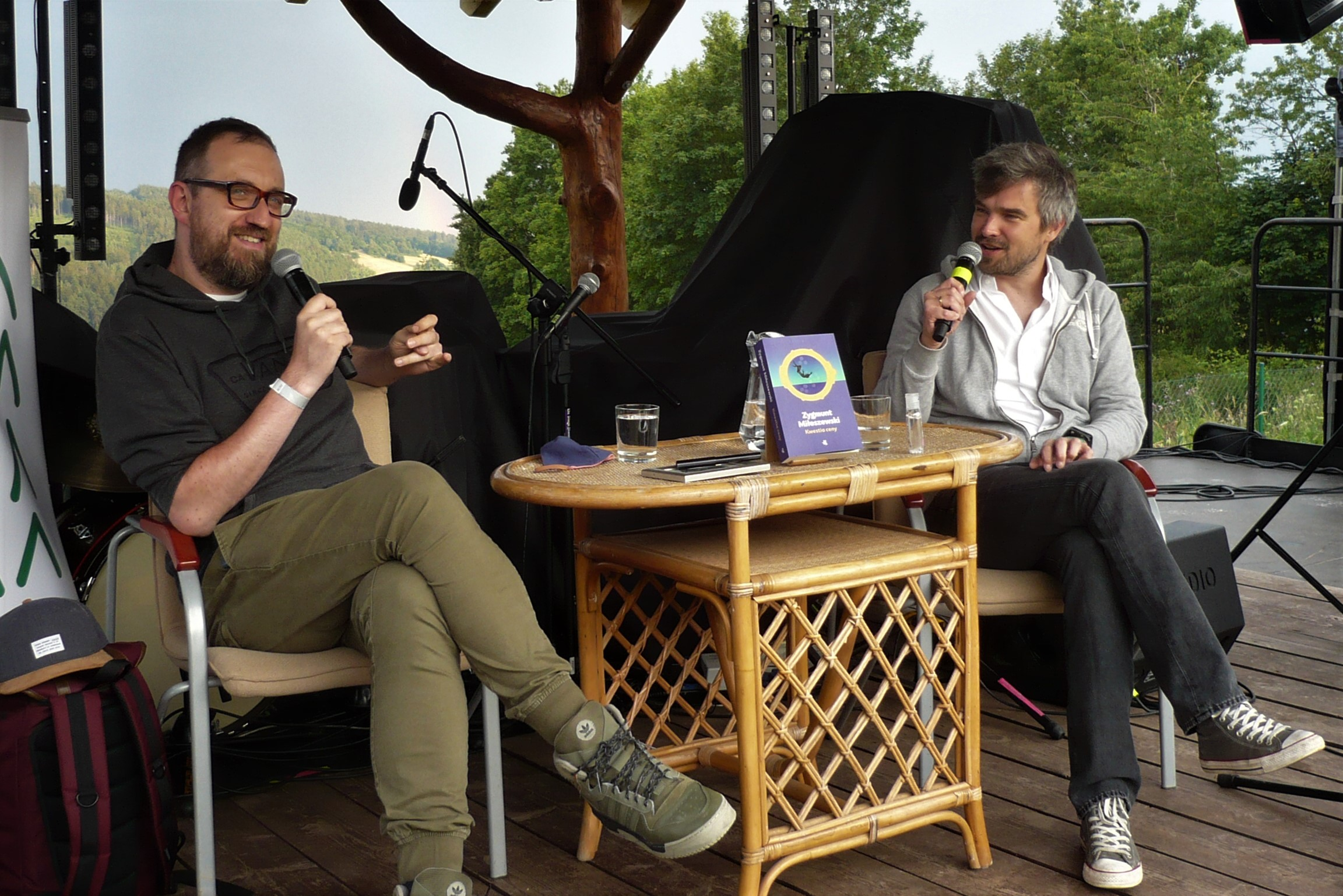 Zygmunt Miłoszewski, VI Festiwal Góry Literatury, Włodowice, Pod Wiatami, 18.07.2020